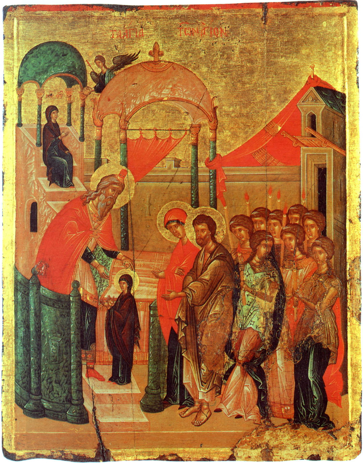 Введение во храм. Середина — третья четверть XV в. Крит Церковно-археологический кабинет при Московской Духовной Академии